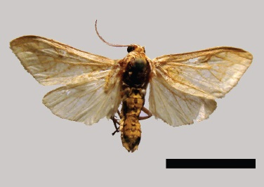 Tessellota trifasciata